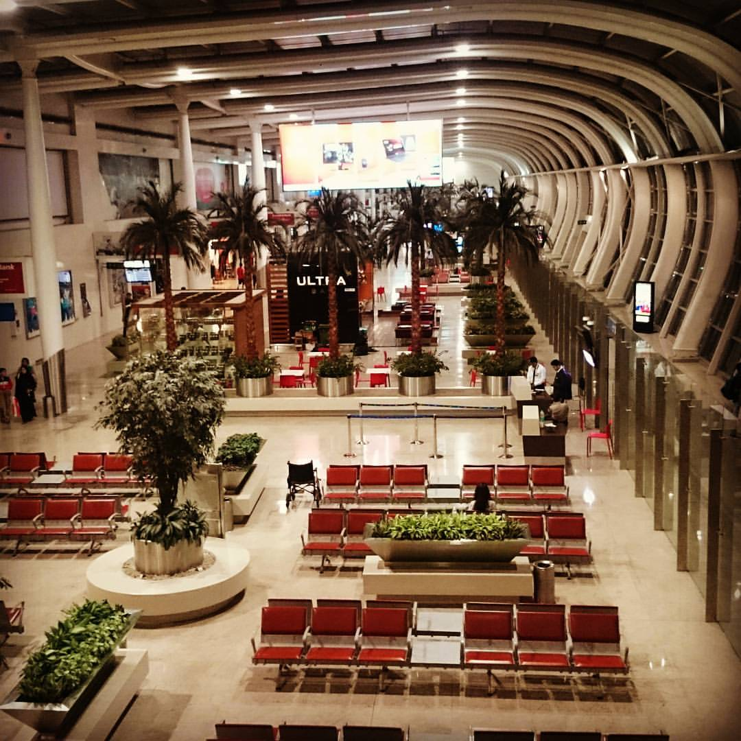 Mumbai Airport Terminal